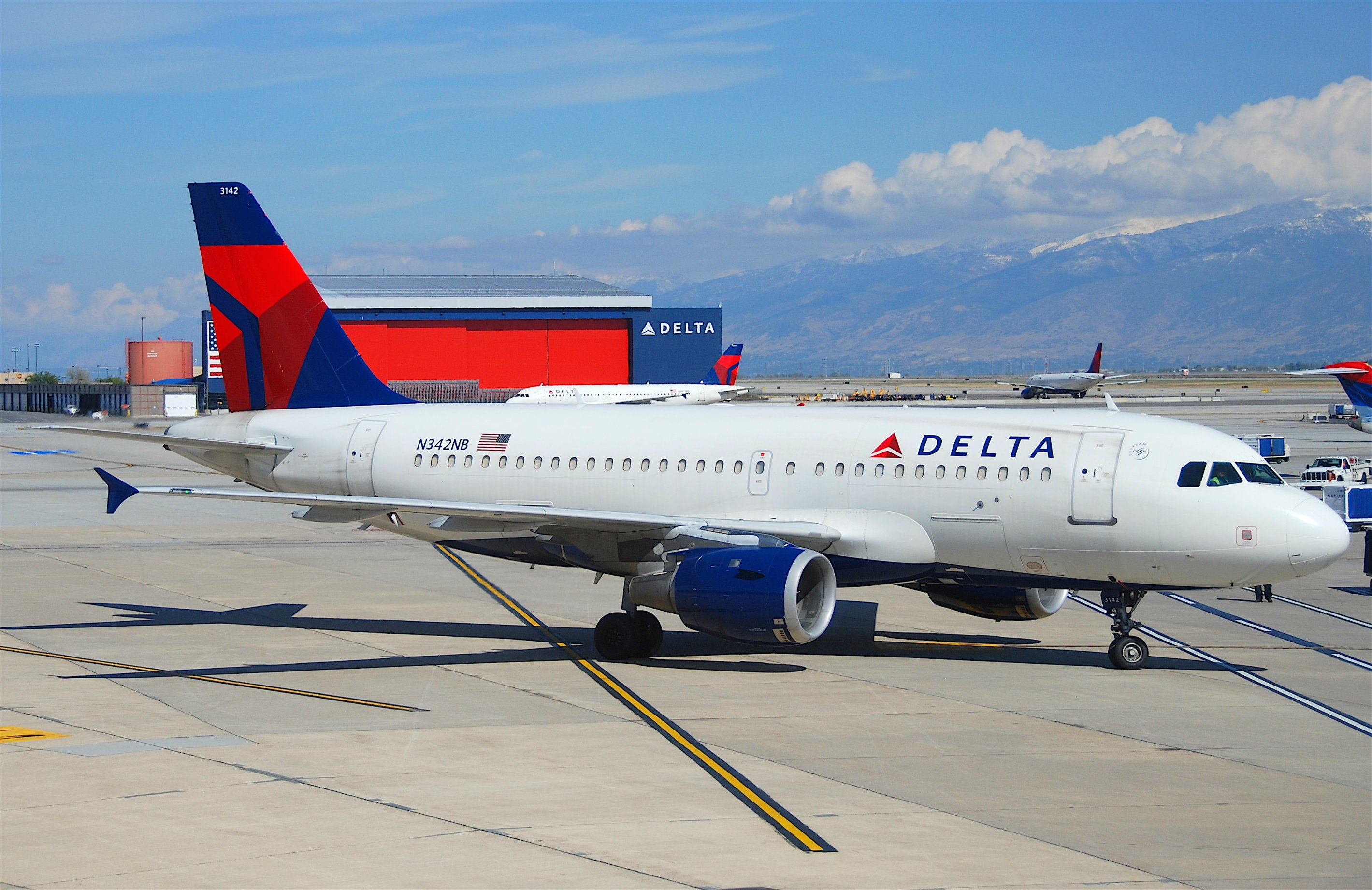 Delta Air Lines Airbus A319-114; N342NB@SLC;09.10.2011/621dl